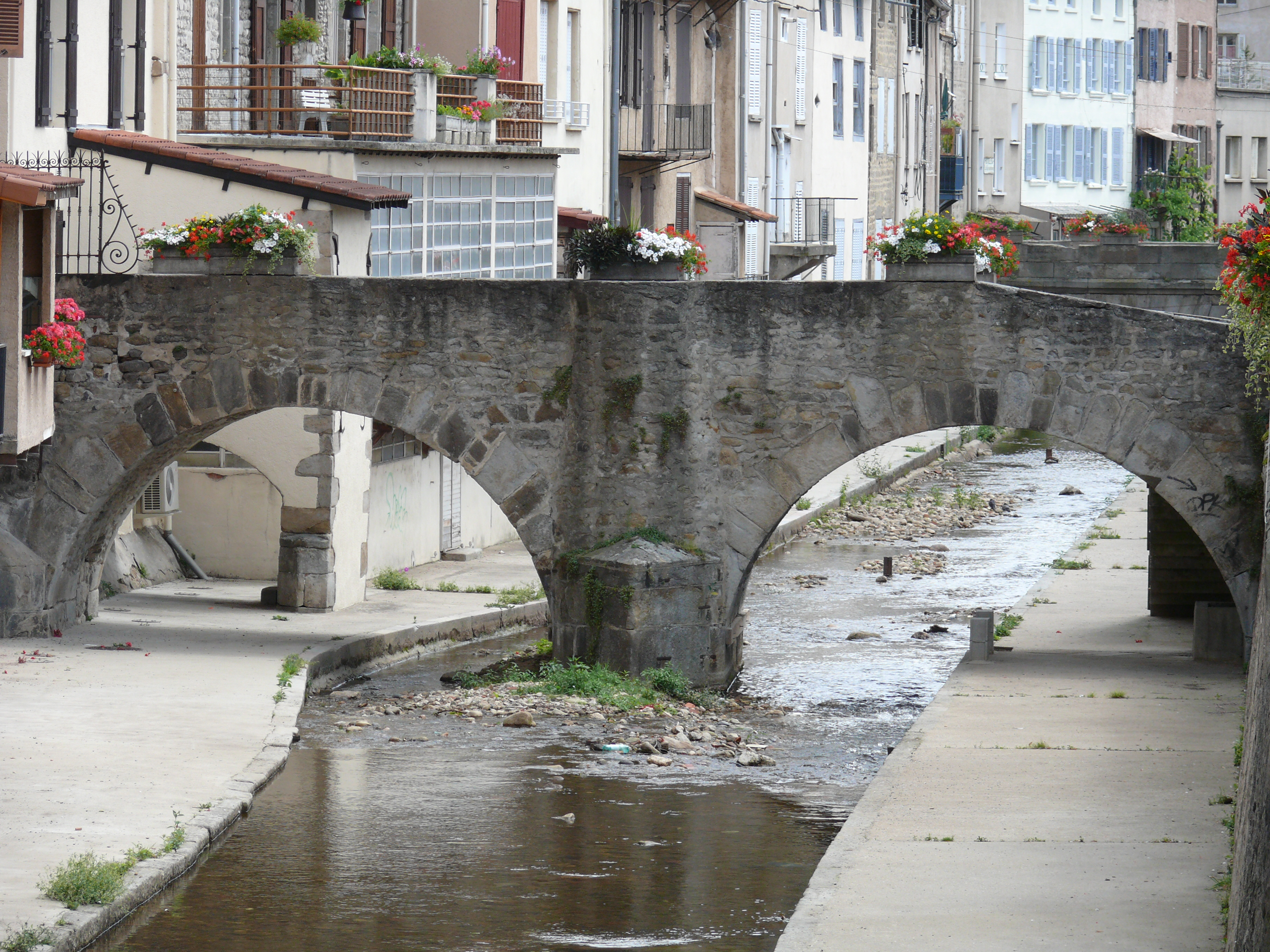 Montbrison - Pont d'Ecotay